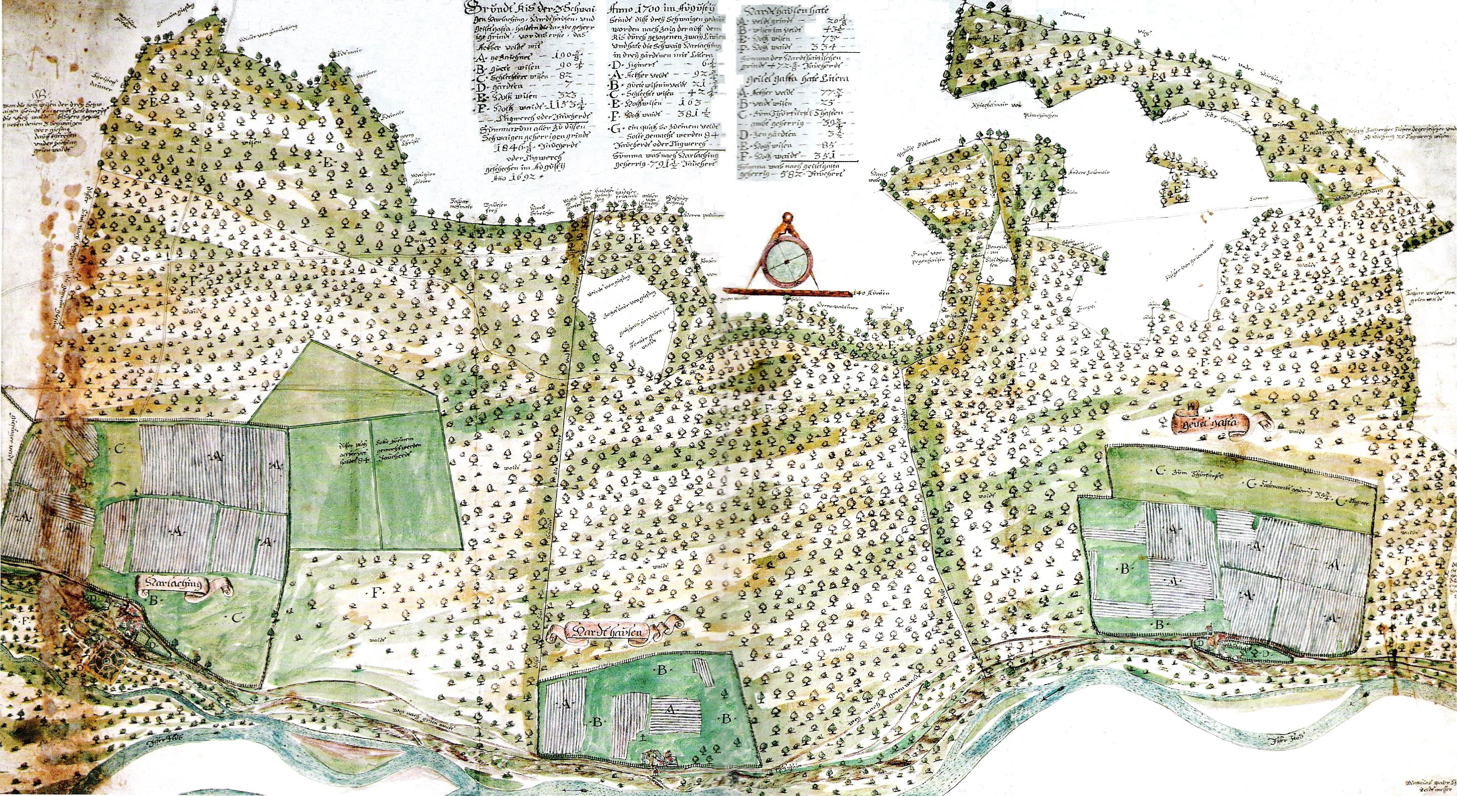 Map of Harlaching, Hardthausen and Geiselgasteig